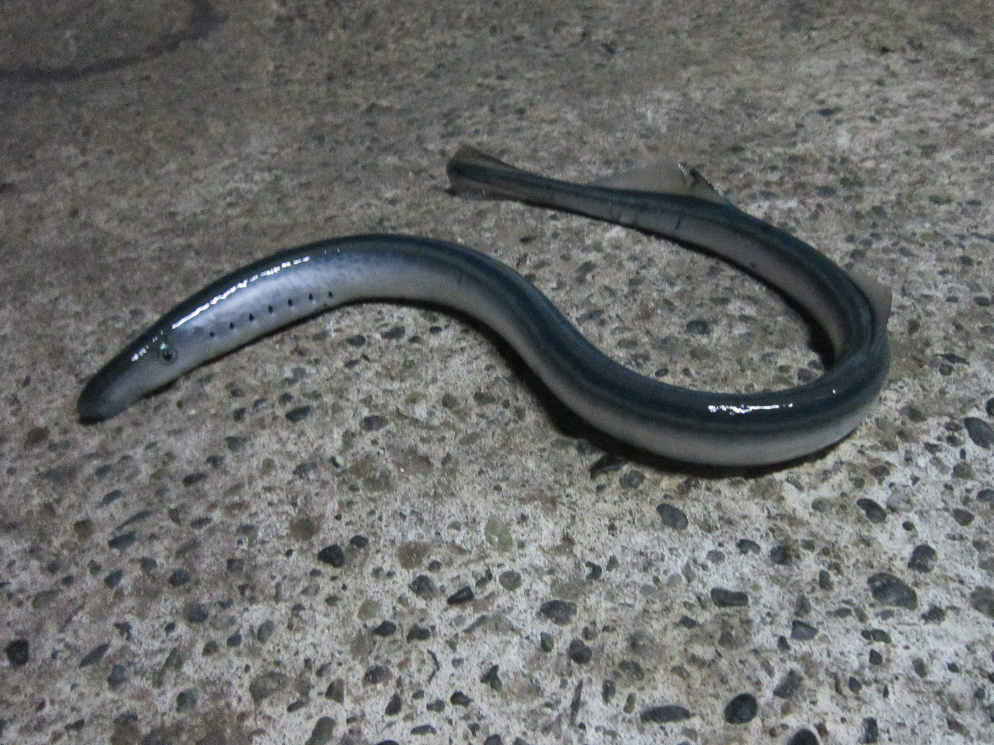 Lamprea de bolsa Geotria australis